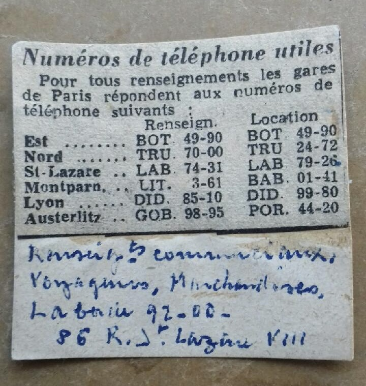 Anciens indicatifs téléphoniques parisiens